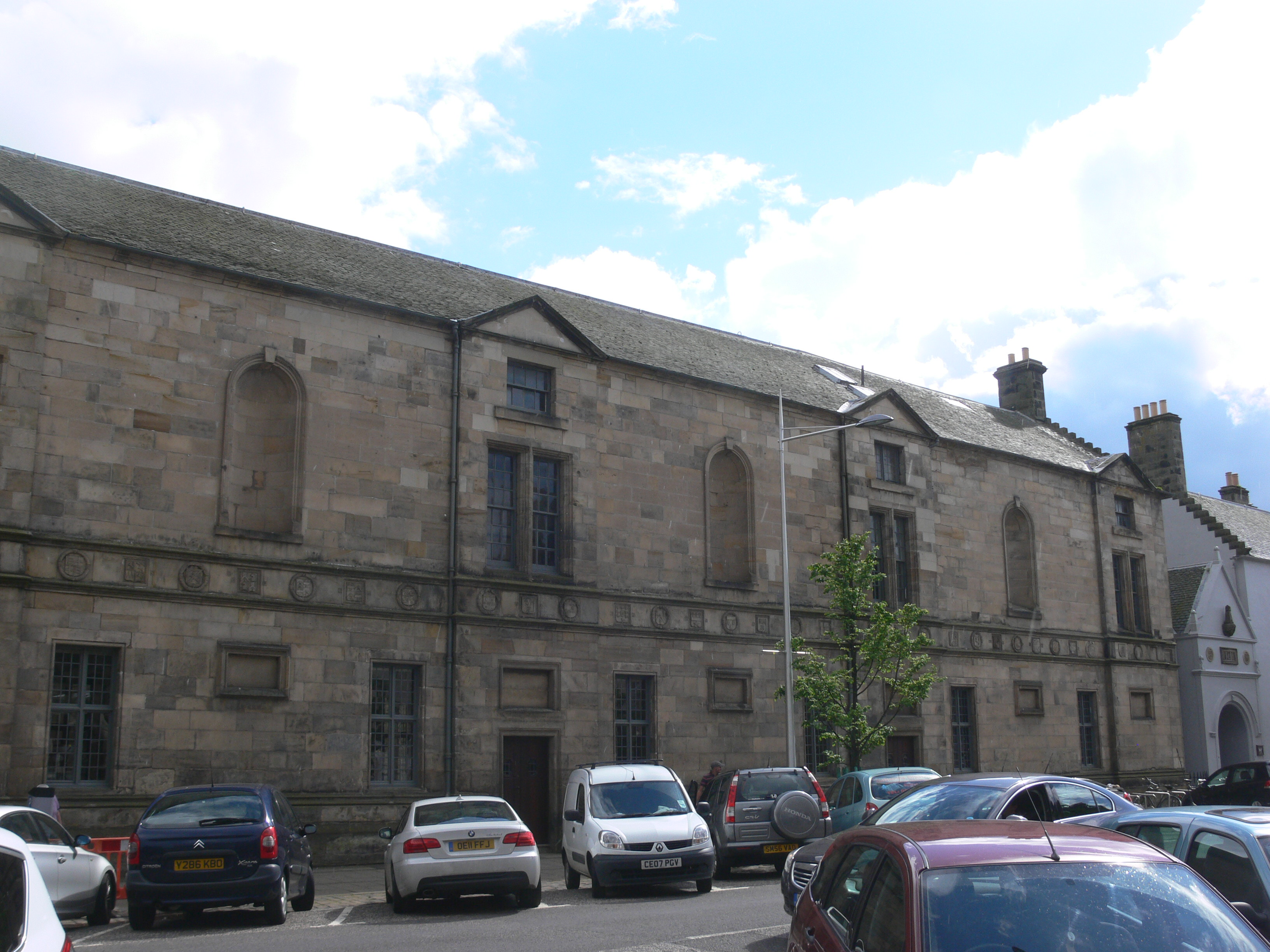 King James Library (South Street)